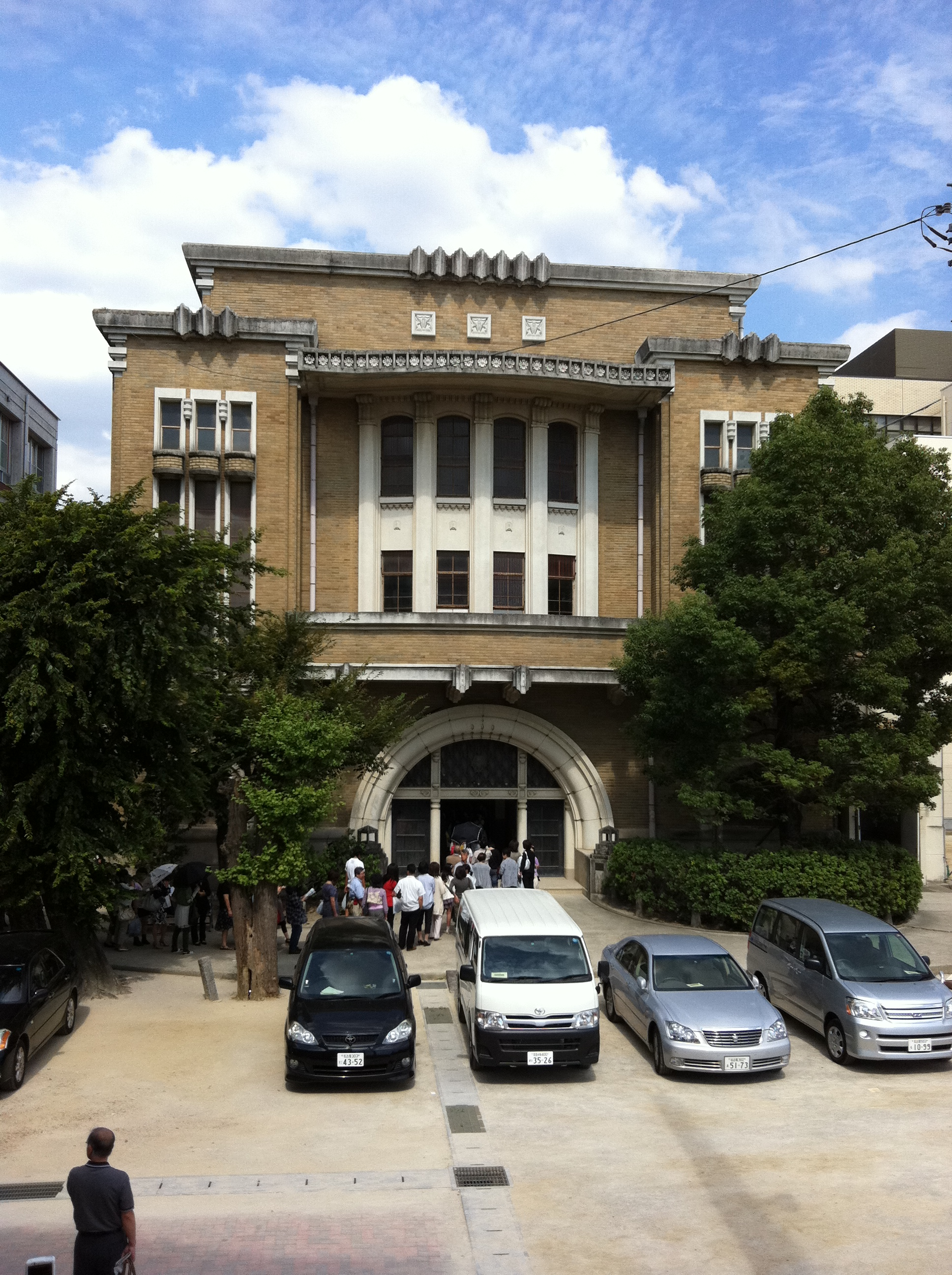 講堂の写真